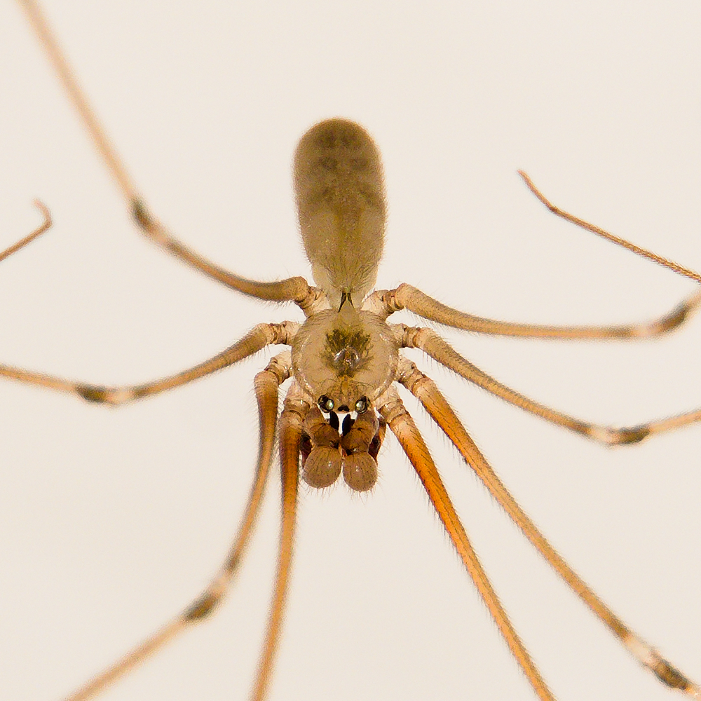 Große Zitterspinne, männlich, mit deutlich sichtbaren verdickten Pedipalpen